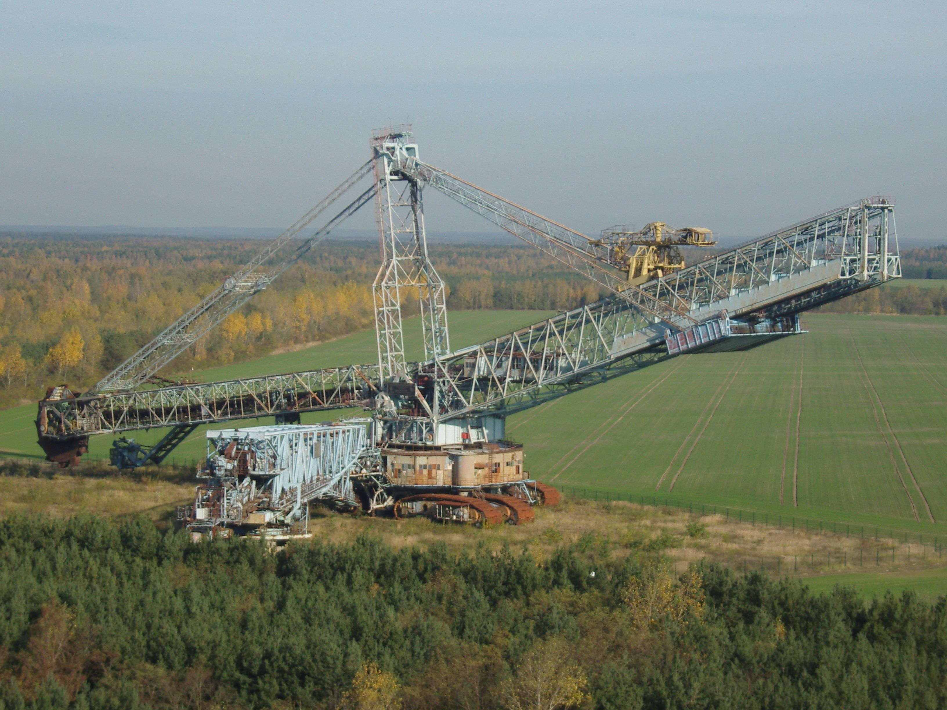 Tagebaubagger im ehemaligen Tagebau Meuro, aufgenommen vom Aussichtsturm Hörlitz